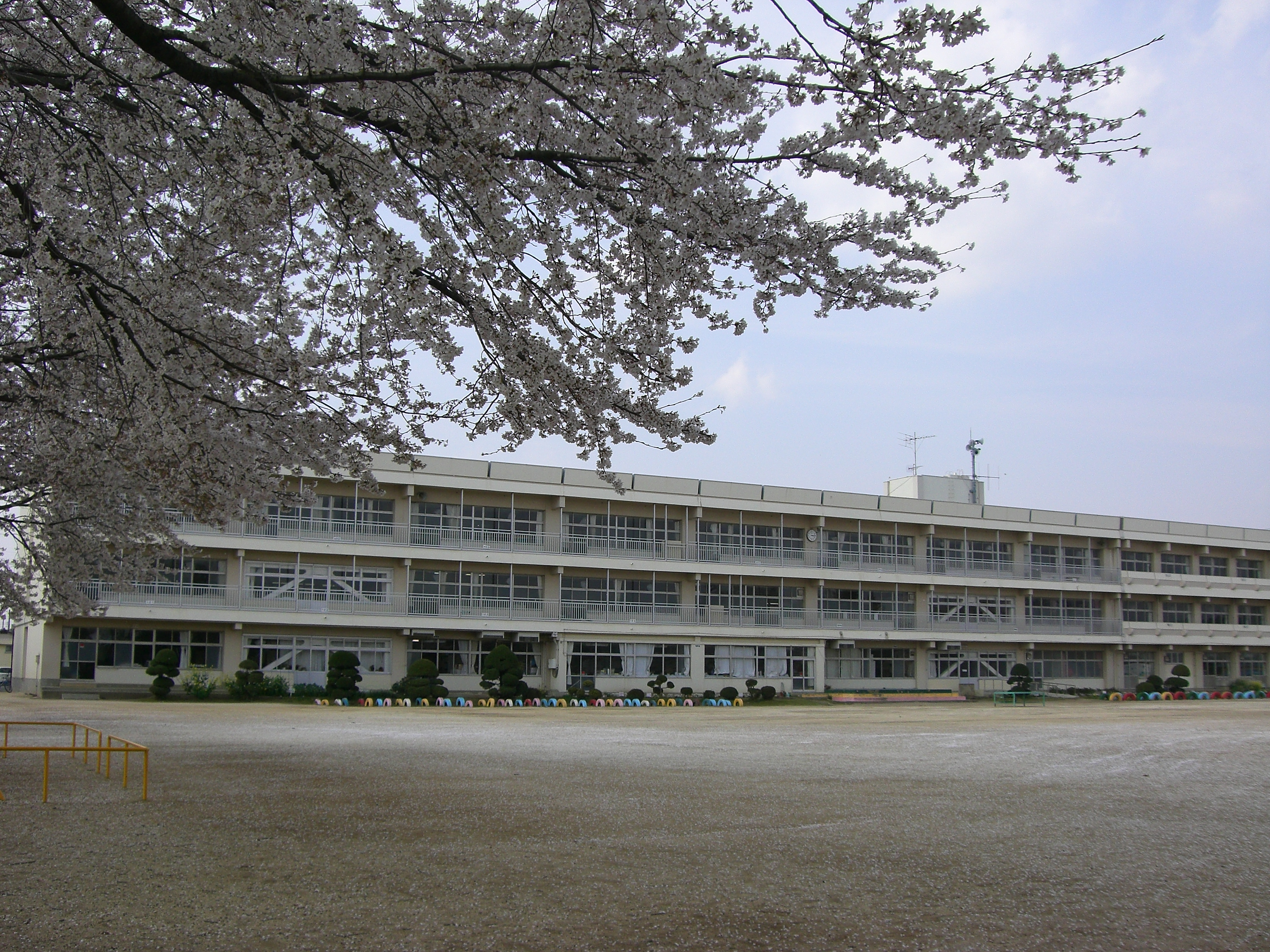 桶川市立桶川西小学校の南校舎。桜の花が咲いている風景。